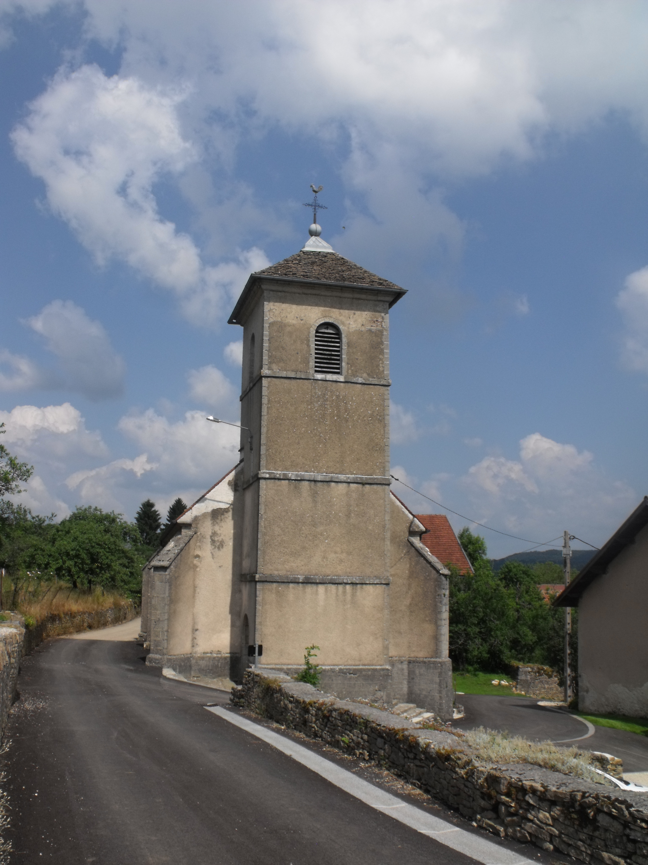 Eglise de Fleurey, Doubs, France